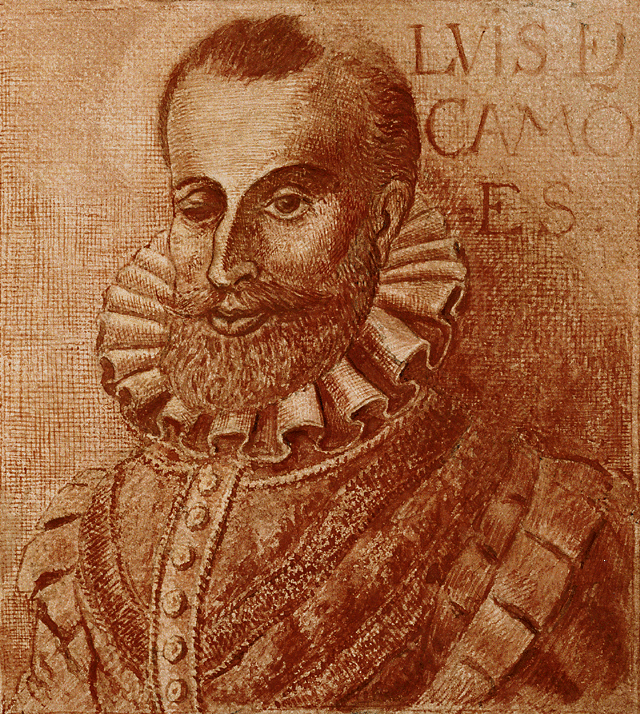 portrait de Luis de Camoens par Fernão Gomes.